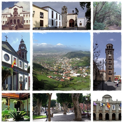 view on La Laguna, Tenerife Teneriffa, La Laguna, Real Santuario del Santísimo Cristo de la Laguna == Teneriffa, La Laguna, Iglesia de La Conception